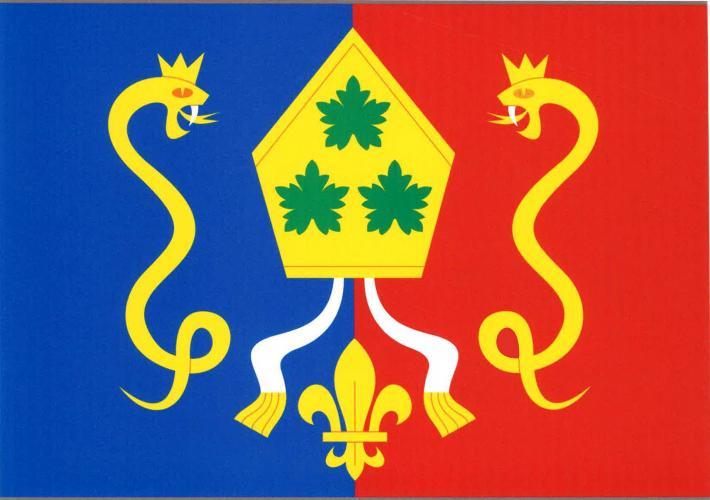 vlajka, Jarpice, okres Kladno